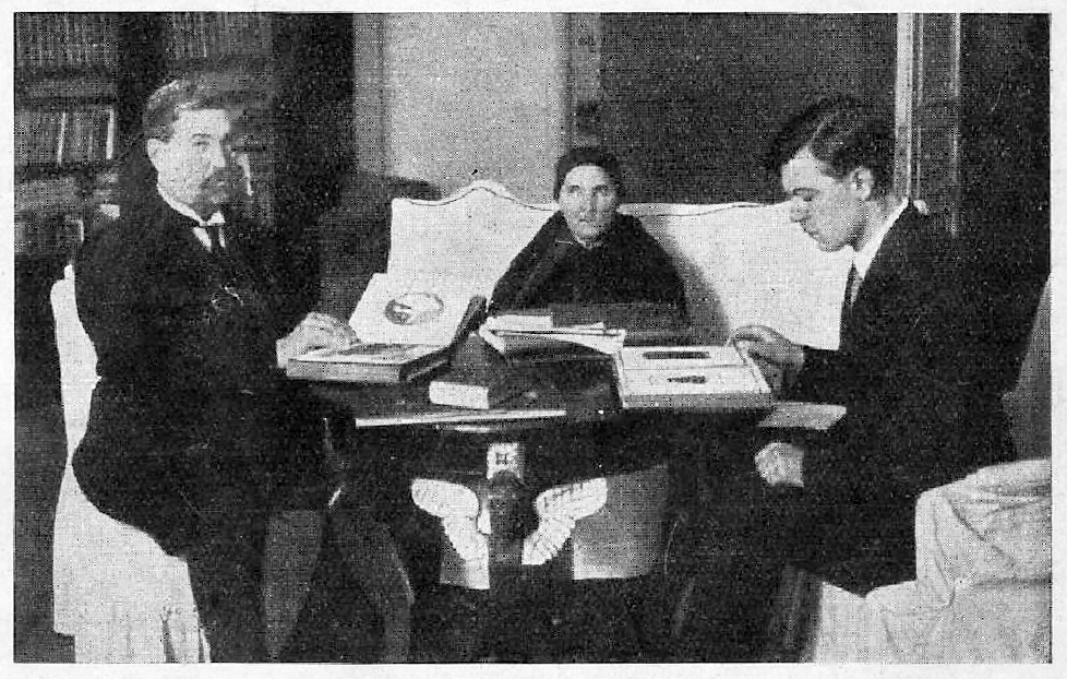 И. С. Проханов с мамой и сыном Ярославом